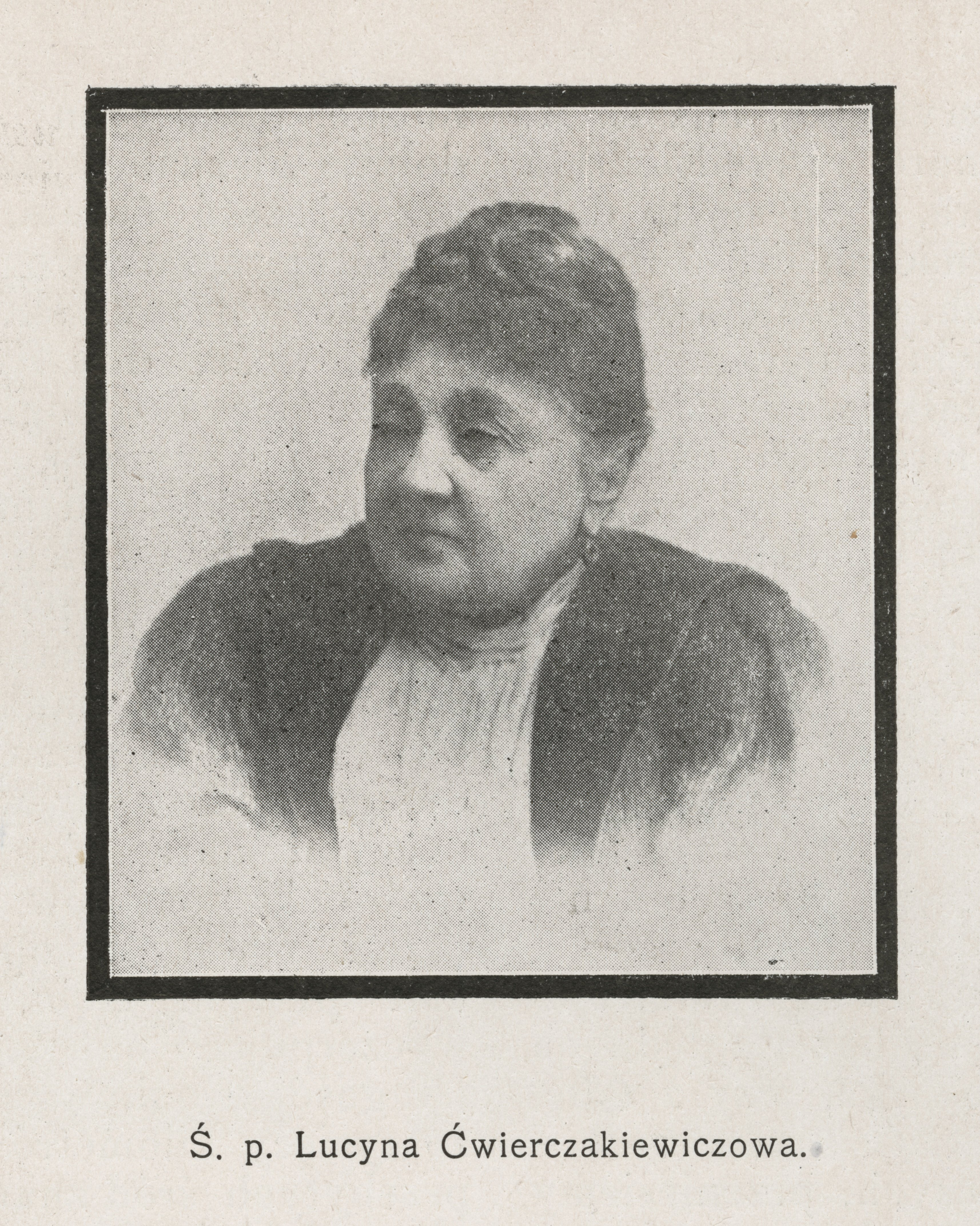 zdjęcie opublikowane w czasopiśmie "Biesiada Literacka". T. 51, 1901 nr 11 s. 198